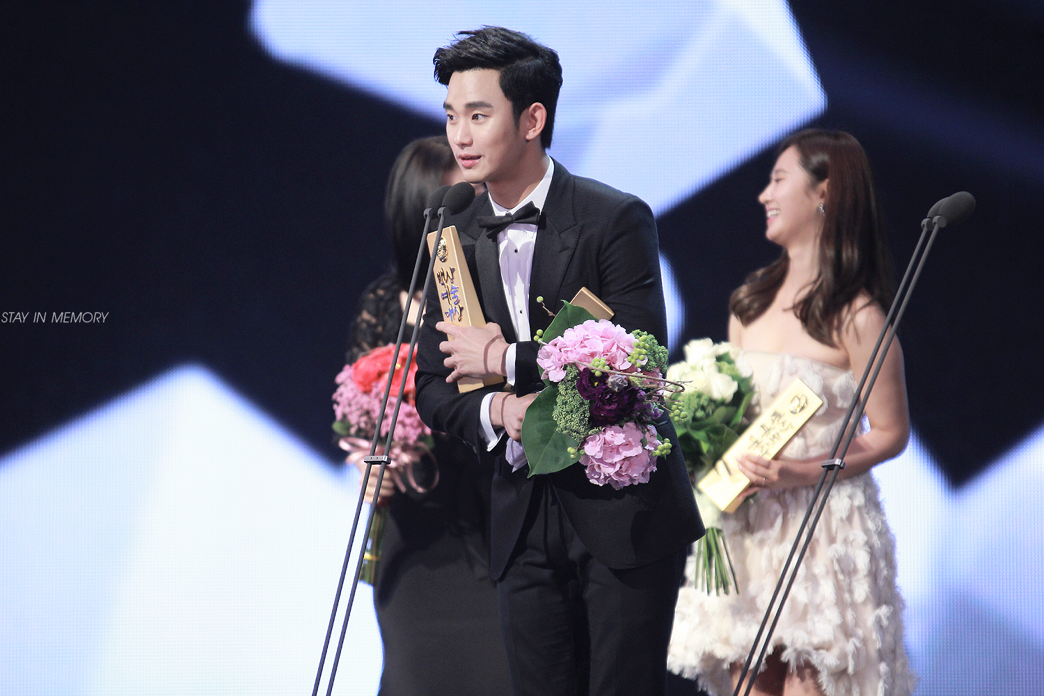 2014 백상예술대상.